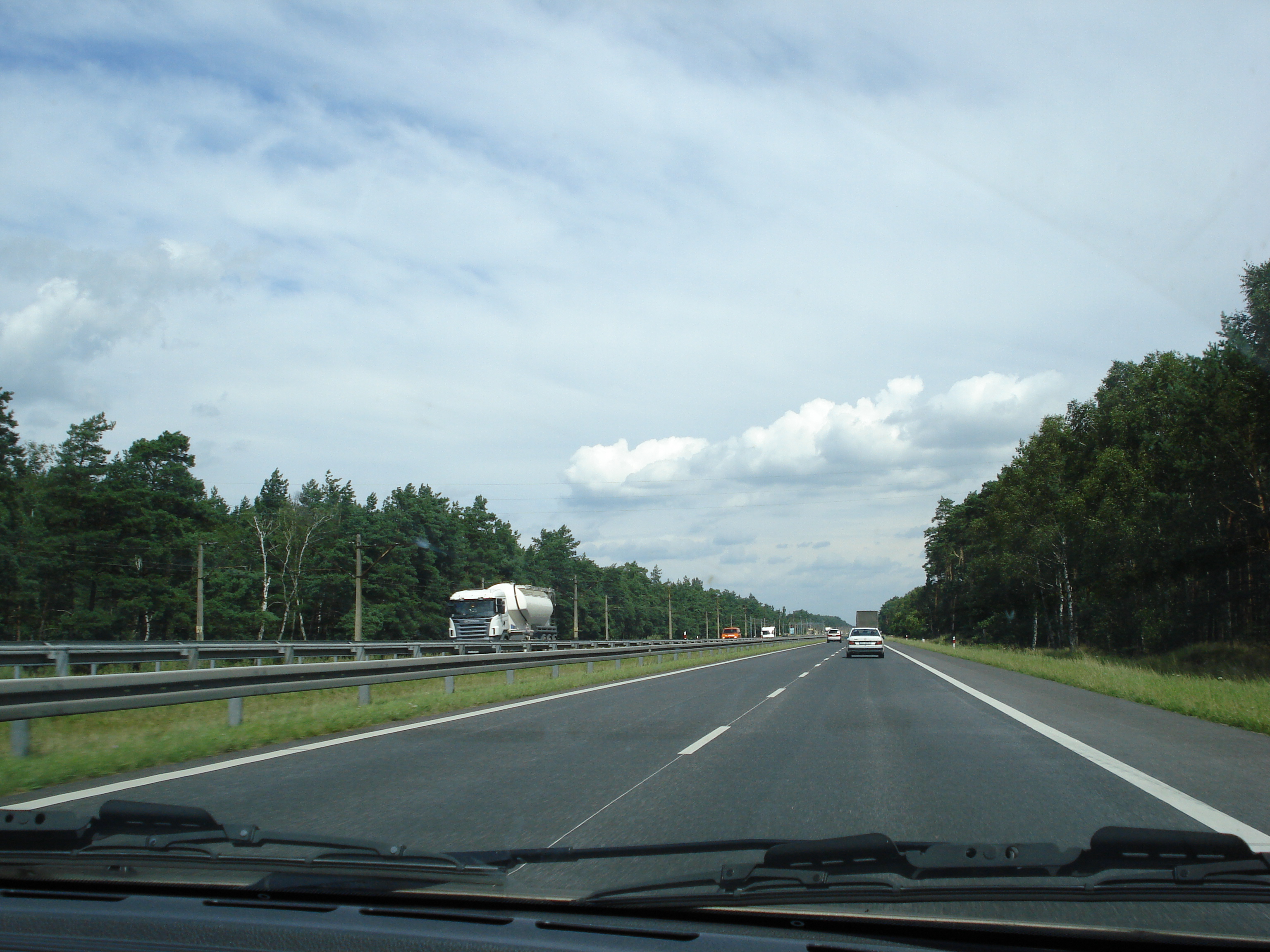 S3